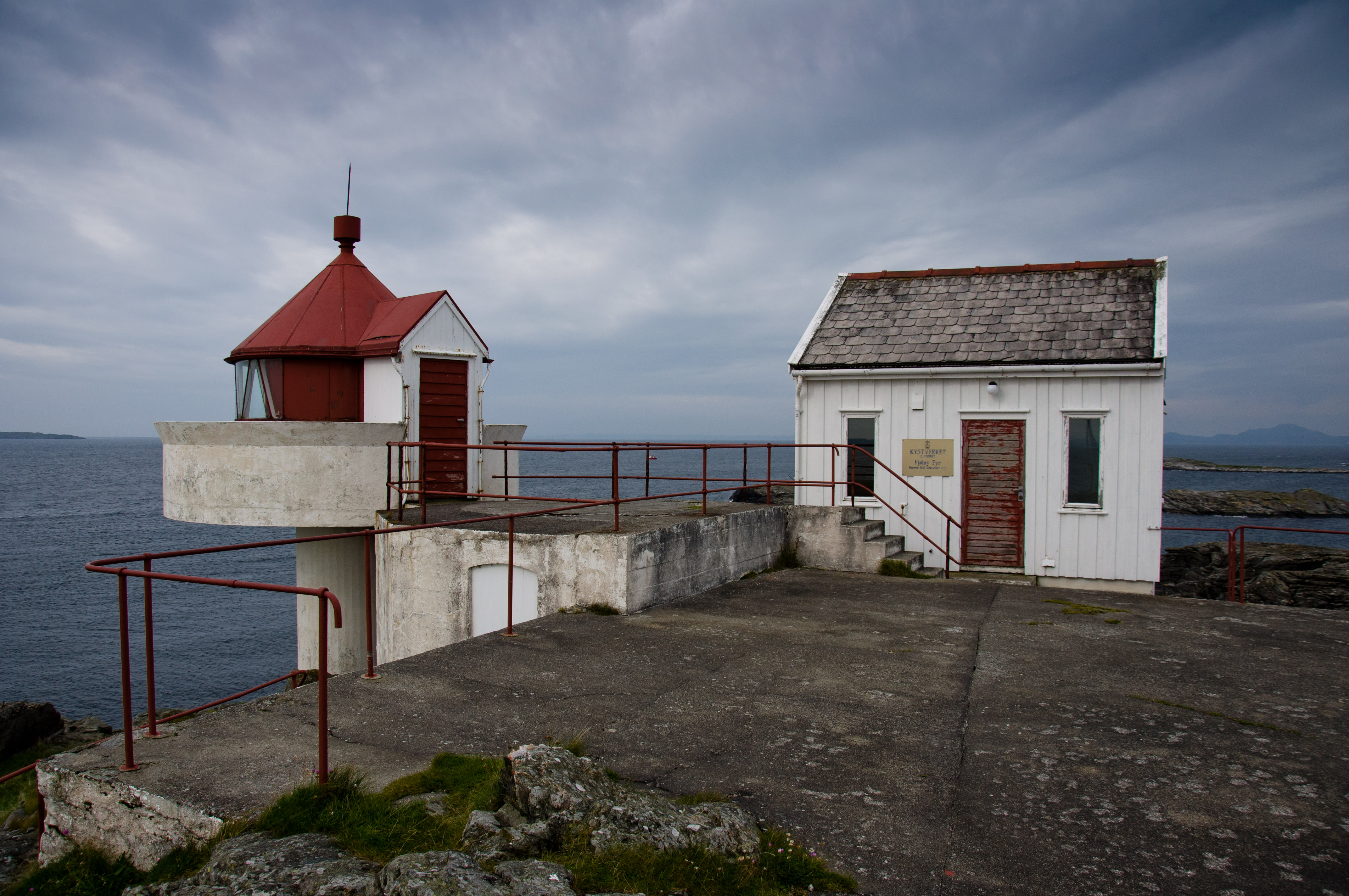 Fjøløy fyr, Rennesøy